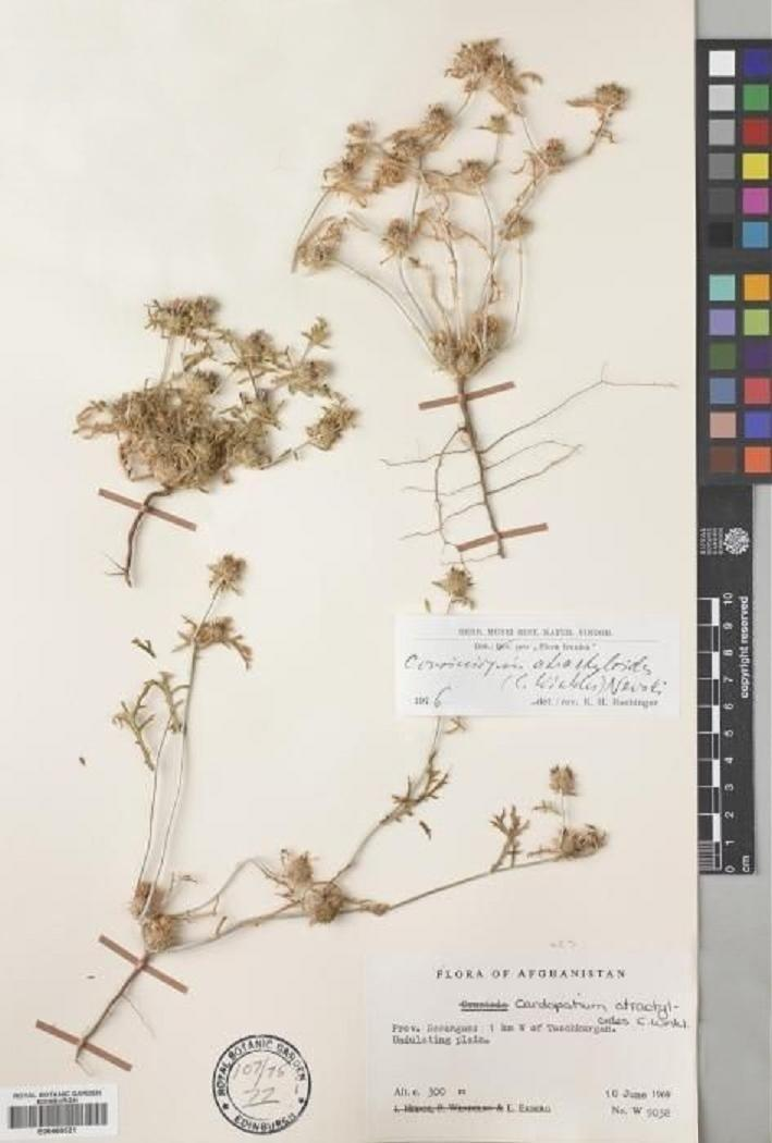 Cousiniopsis atractyloides